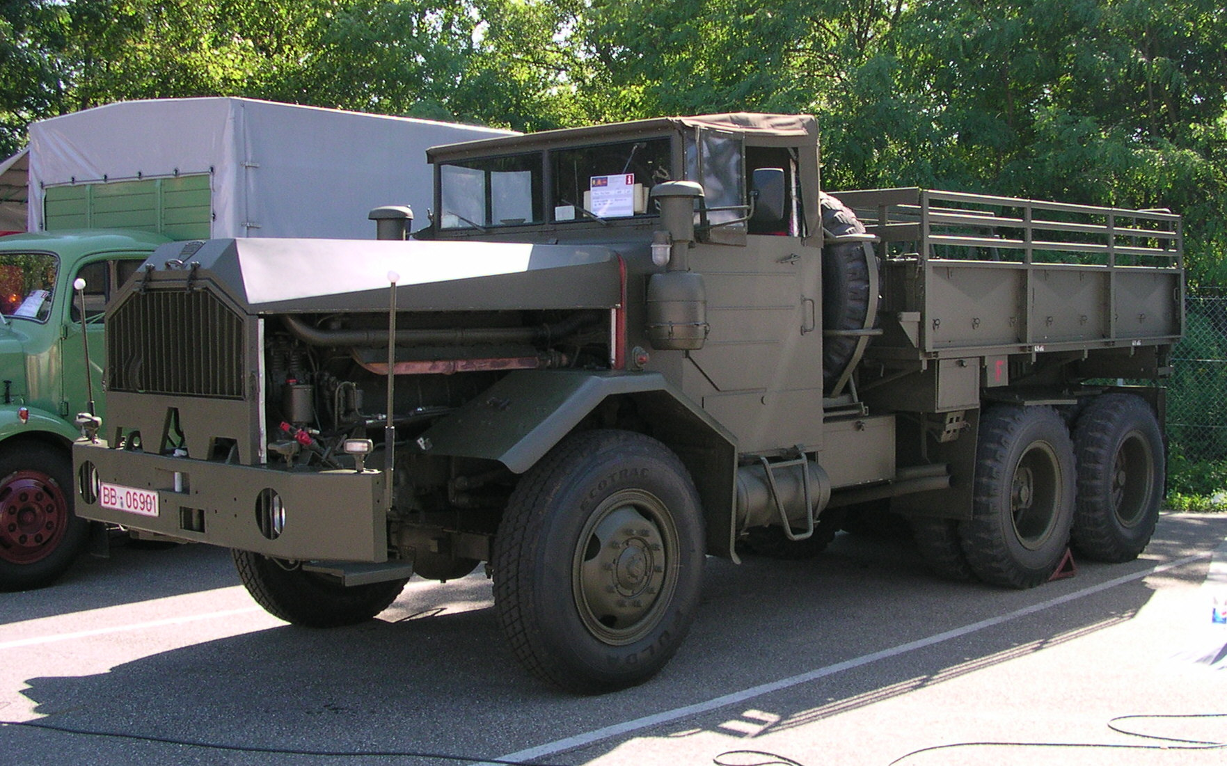 Wörth am Rhein, Oldtimer-Treffen bei Daimler-Chrysler. Faun Bundeswehr-Dreiachser